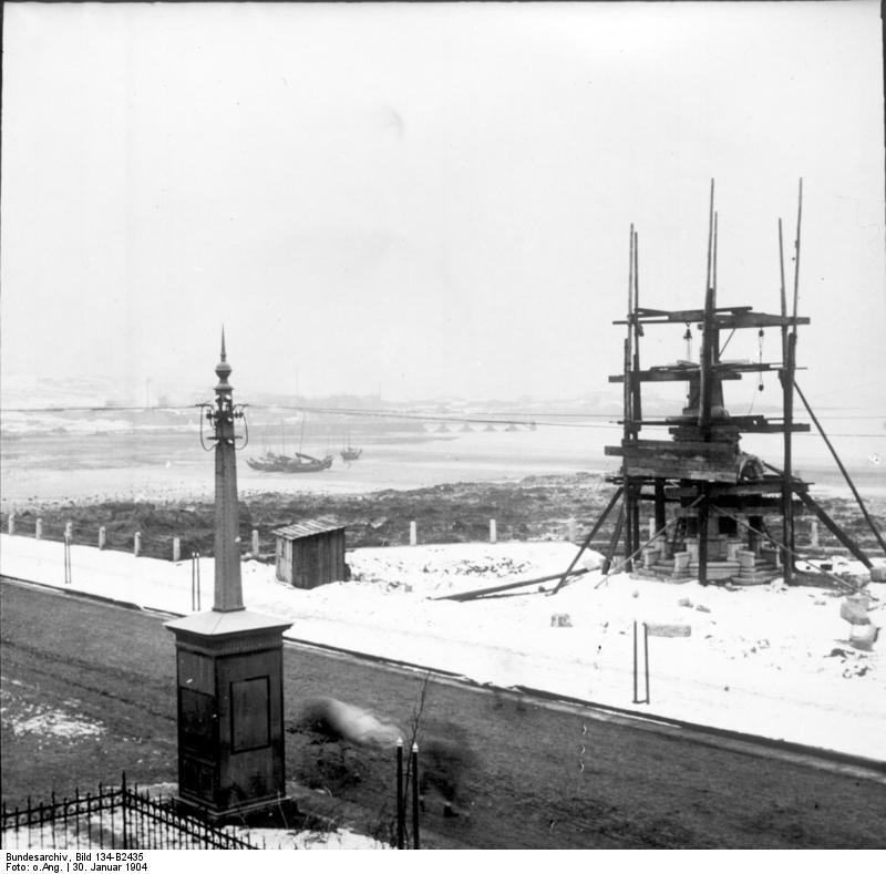 Schutzgebiet Kiautschou 30. Jan. 1904: Joeschke-Denkmal im Bau